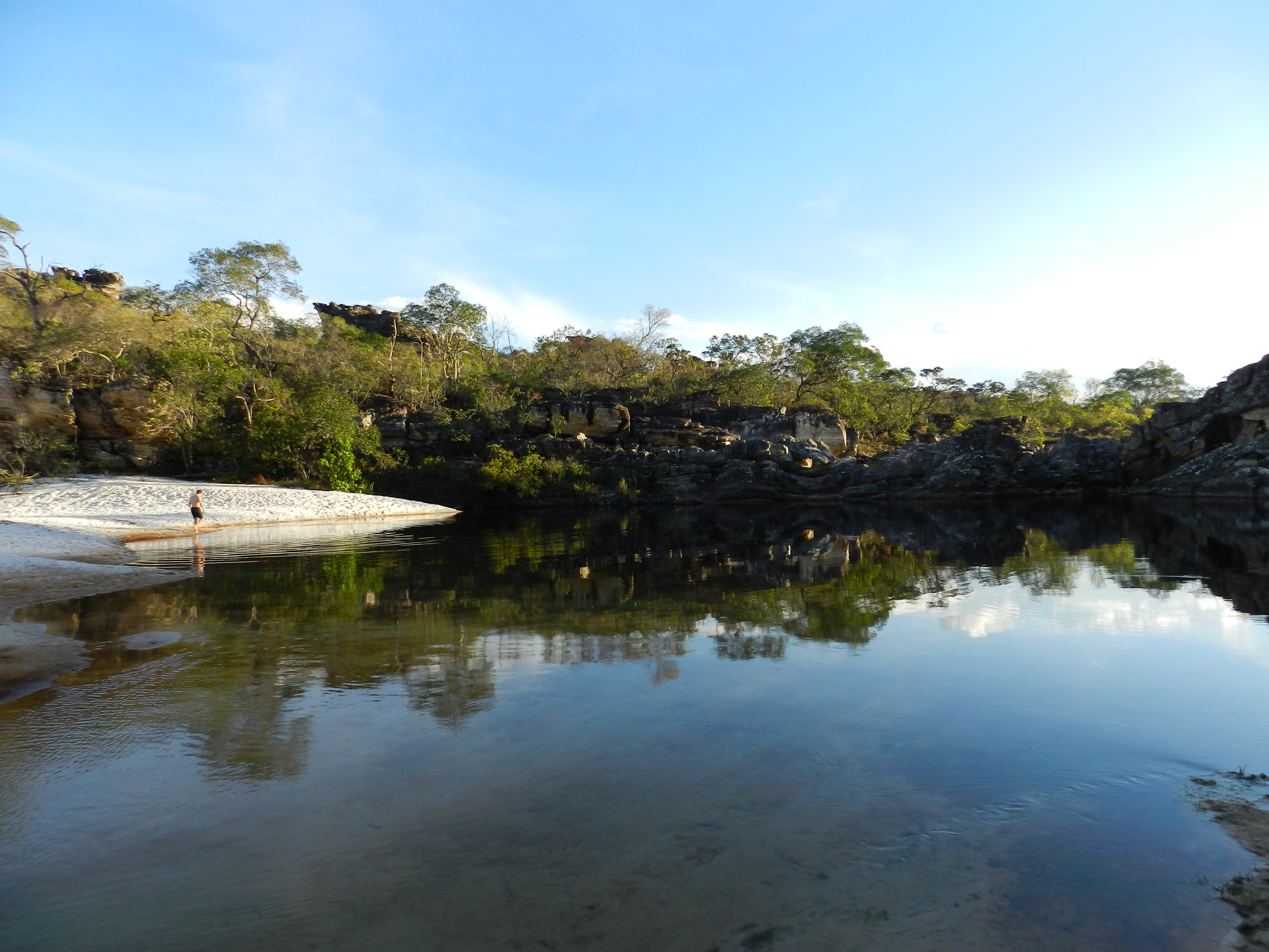 Pôr do sol nas escuras águas do Rio Preto, em Poço do Veado.